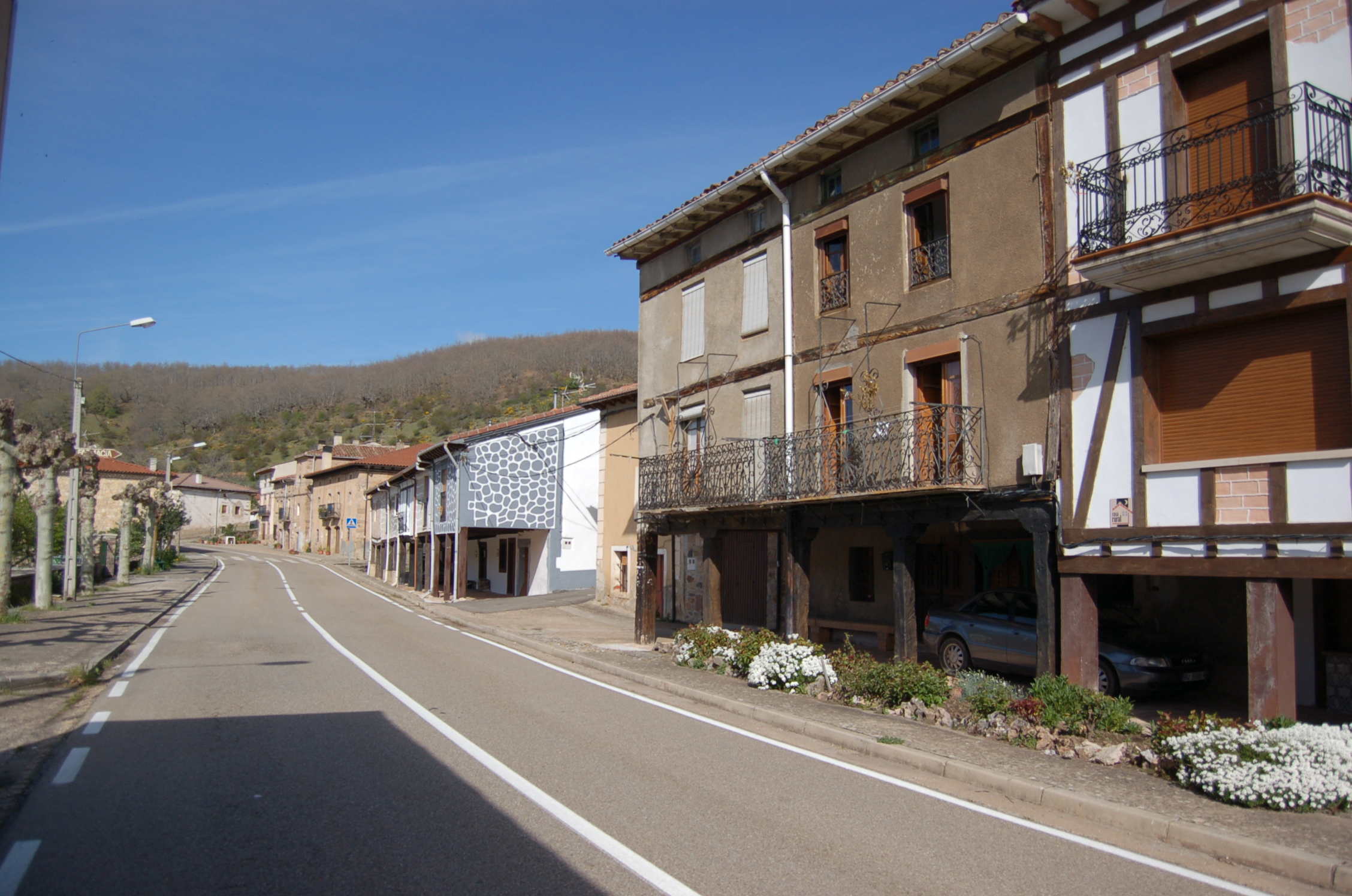 Carretera BU-825 a su paso por Barbadillo del Pez